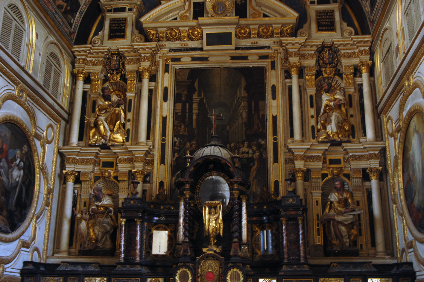 Retable baroque de la chapelle Saint-Louis du collège Henri IV de Poitiers